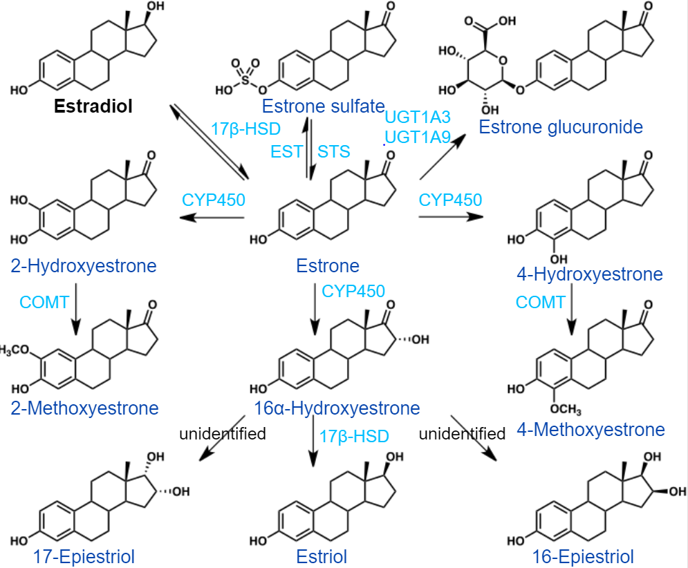 נתיבים מרכזיים במטבוליזם של אסטרדיול בגוף האדם